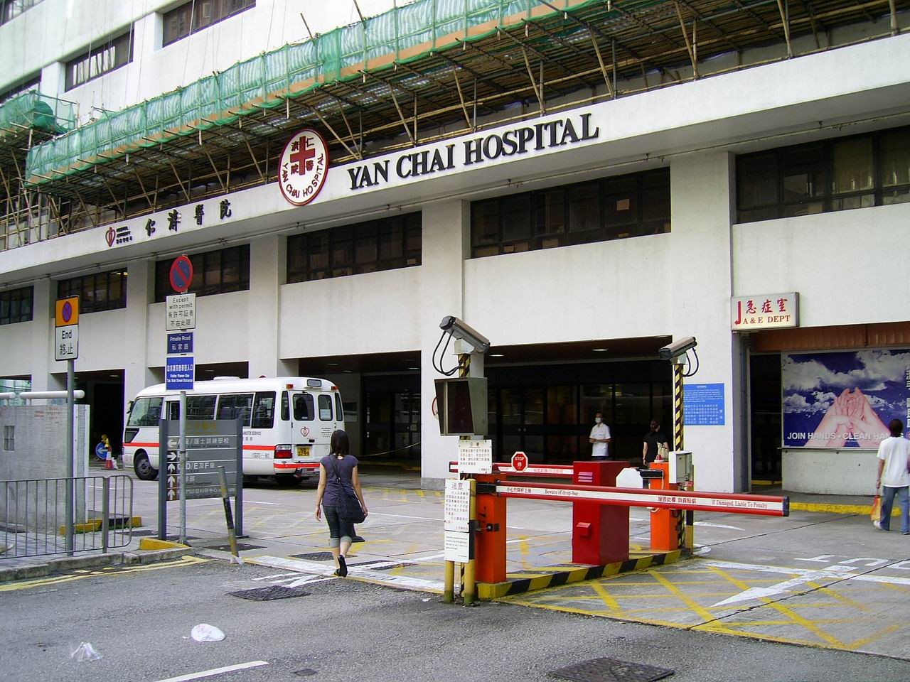 中文（香港）: 仁濟醫院急症室入口